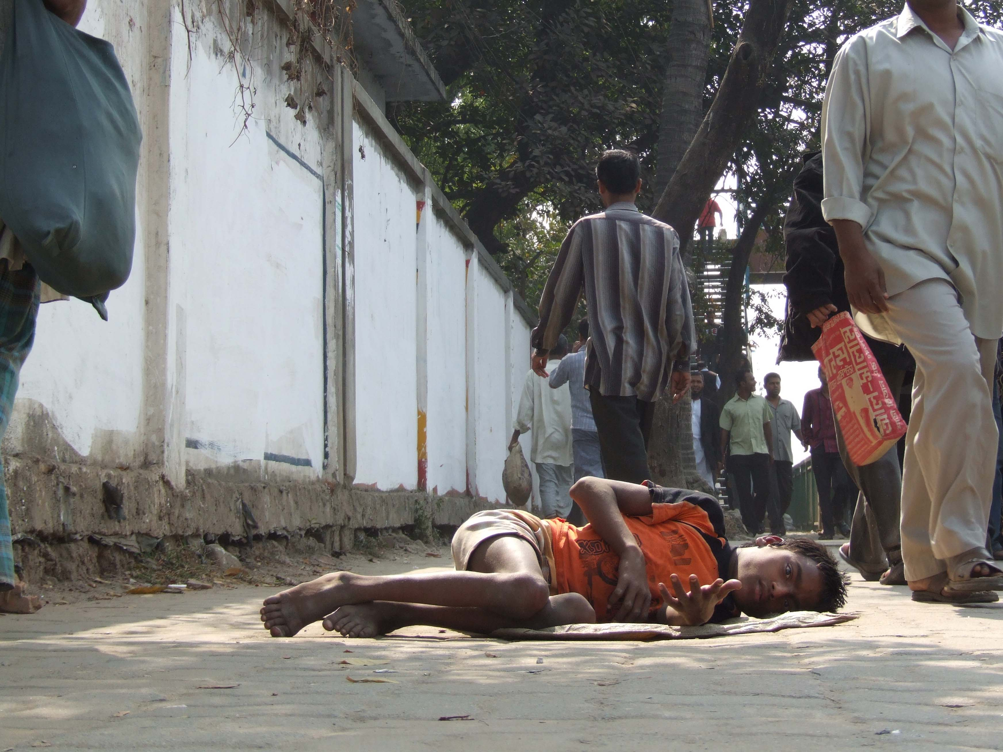 Disabled beggar in Dhaka, Bangladesh.